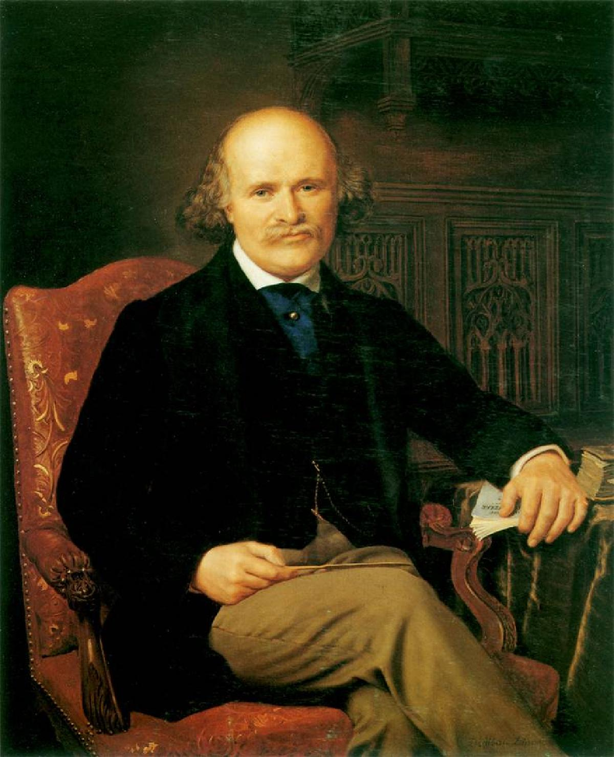 Portrait peint